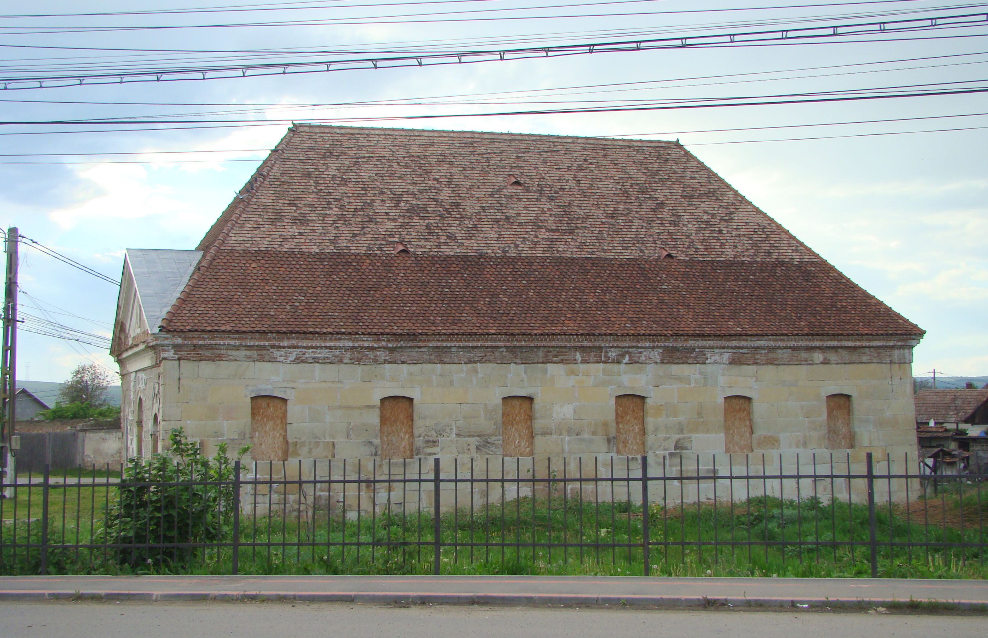 Grânarele, sat Bonțida; comuna Bonțida 05